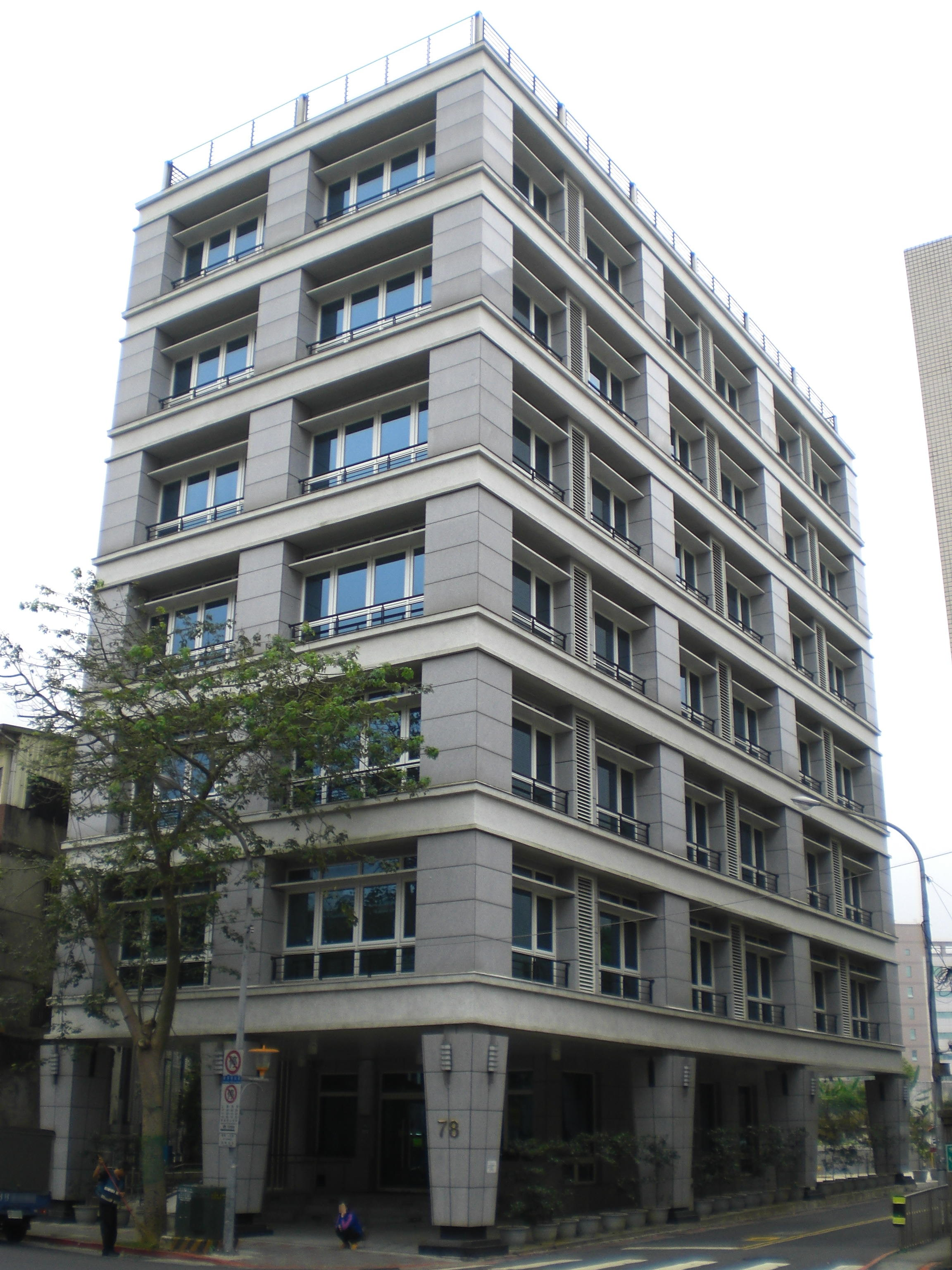 中華民國考選部第三試務大樓，位於臺北市文山區木柵路一段78號，2012年10月18日揭牌啟用。